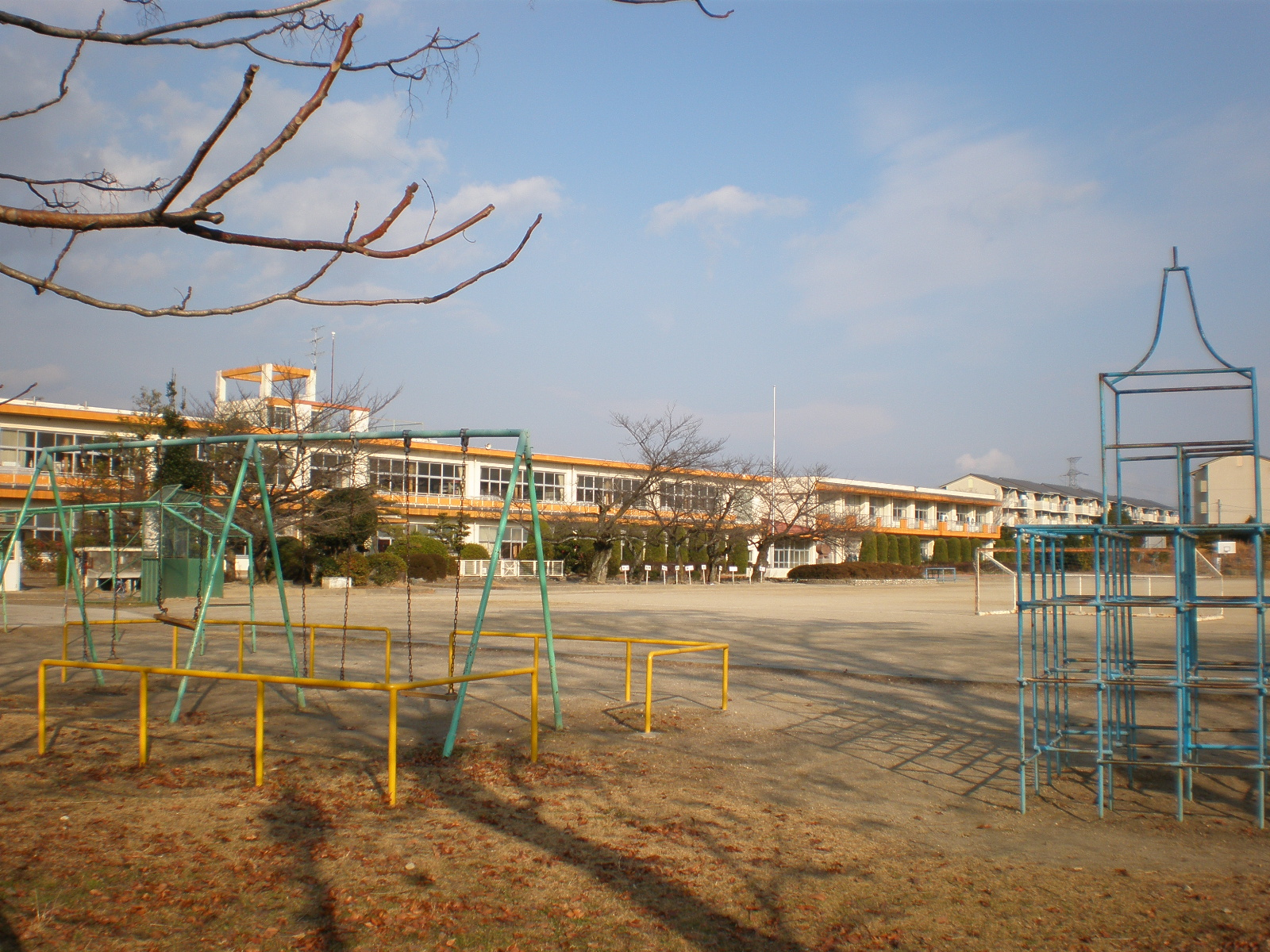 愛知県小牧市にある篠岡小学校